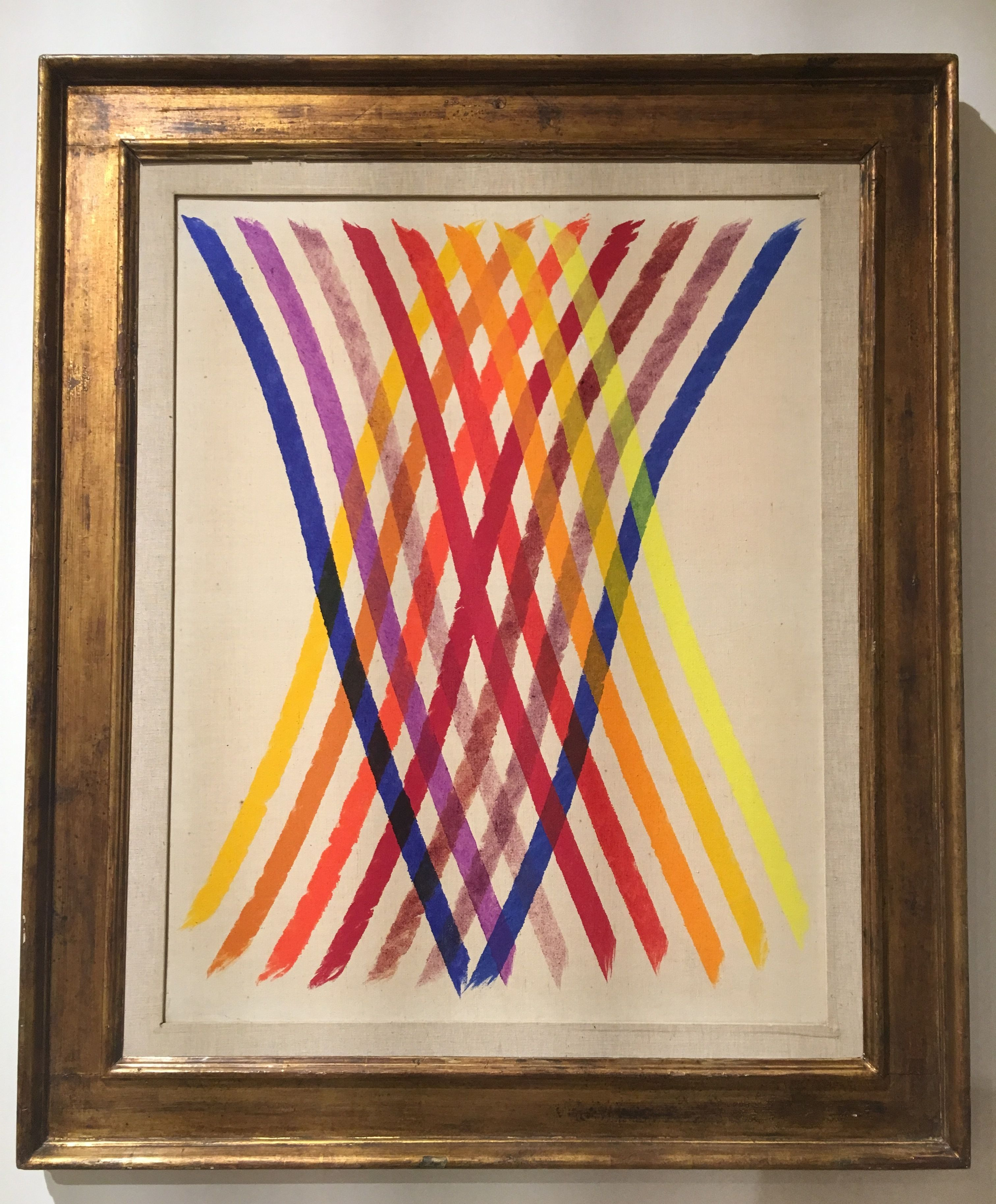 Pinacoteca civica Bruno Molajoli